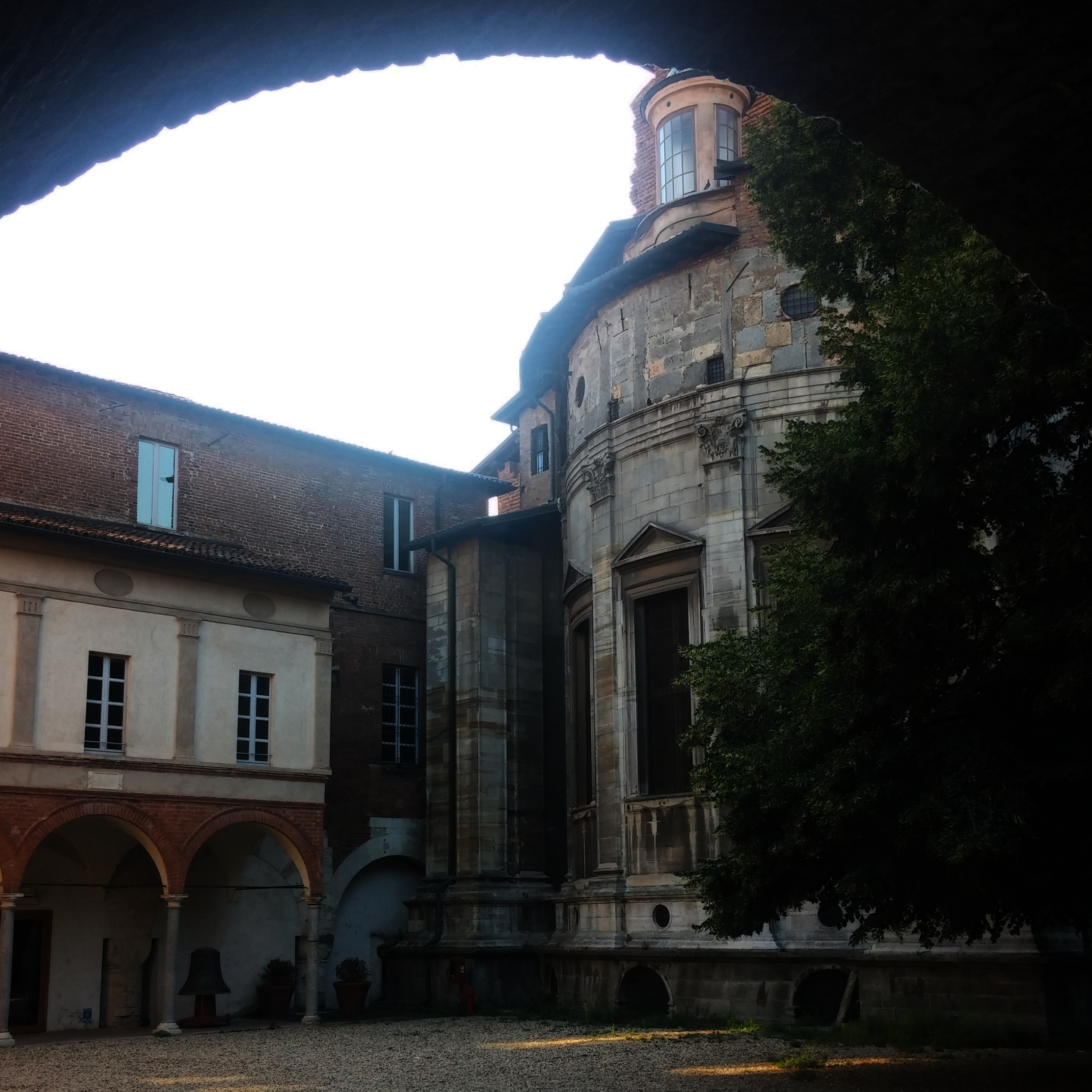 Palazzo Broletto This is a photo of a monument which is part of cultural heritage of Italy.